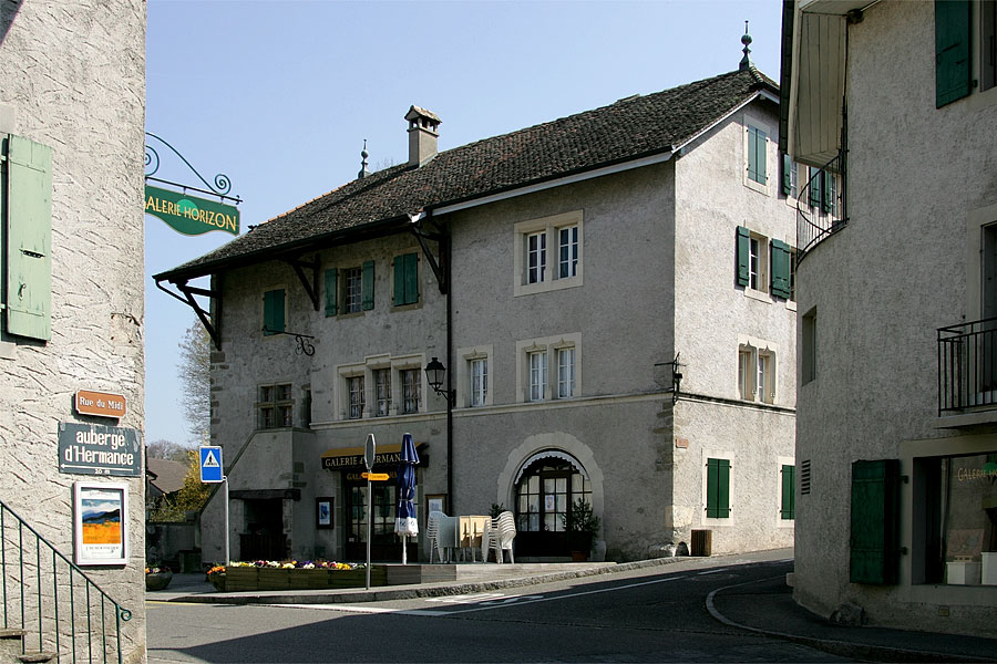 Bäckerei und Café in Hermance